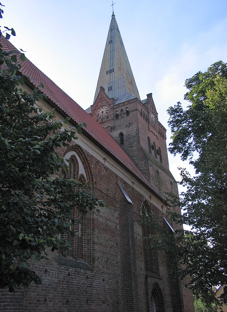 Beschreibung: Bad Sülzer Stadtkirche Fotograf: Darkone, 2. September 2004